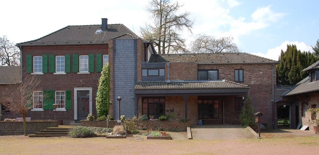 Der Innenhof von Neu Ikoven (Bommershof) 2008